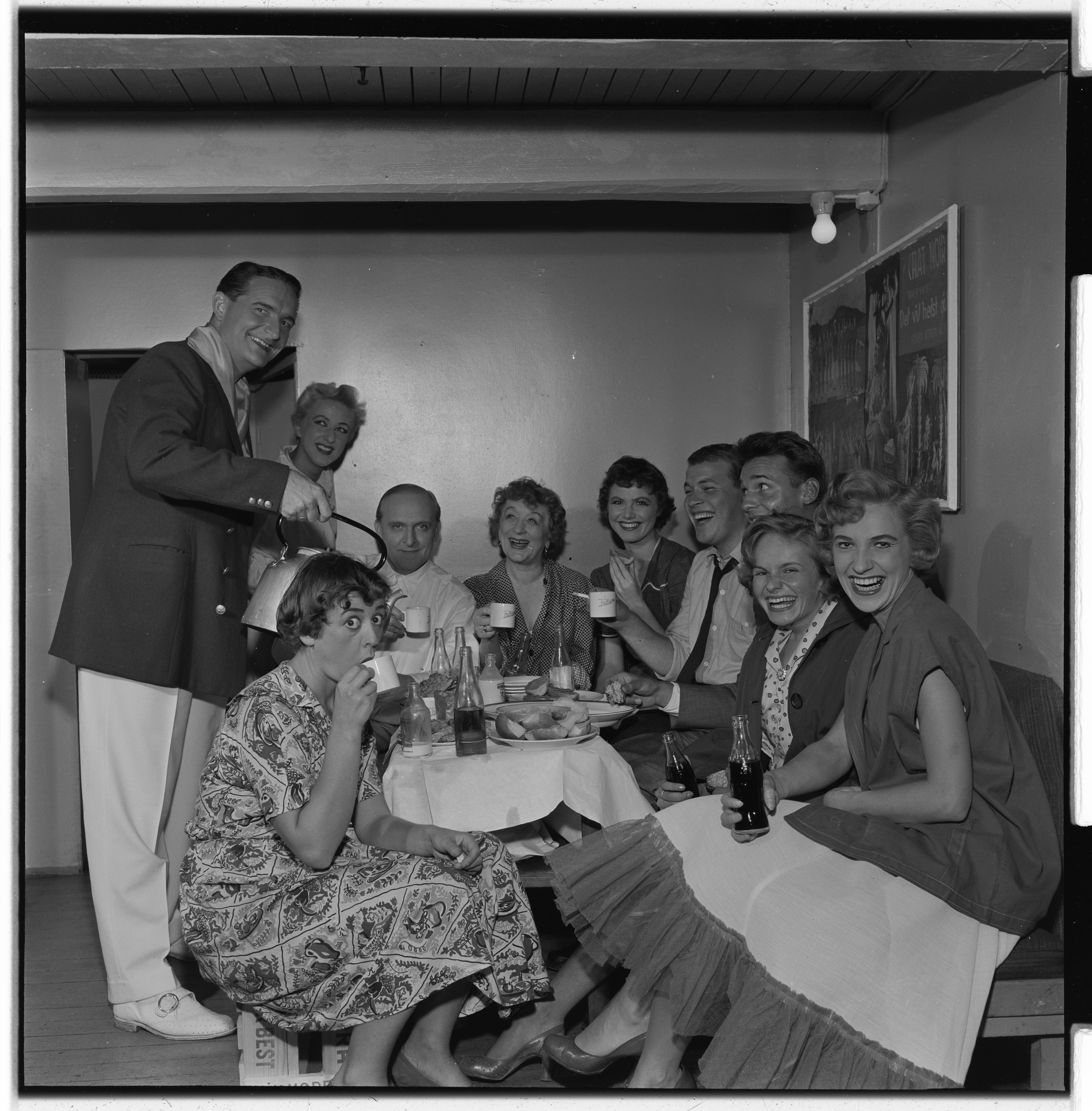 Bildet er hentet fra Arkivverket. Chat Noir revyen 1955. NÅ nr. 37,1955 Arkivinstitusjon : Riksarkivet Arkivnavn : Billedbladet NÅ Sted : Norge, Oslo, Oslo, Emneord: teater, revy, chat noir, skuespillere Avbildet